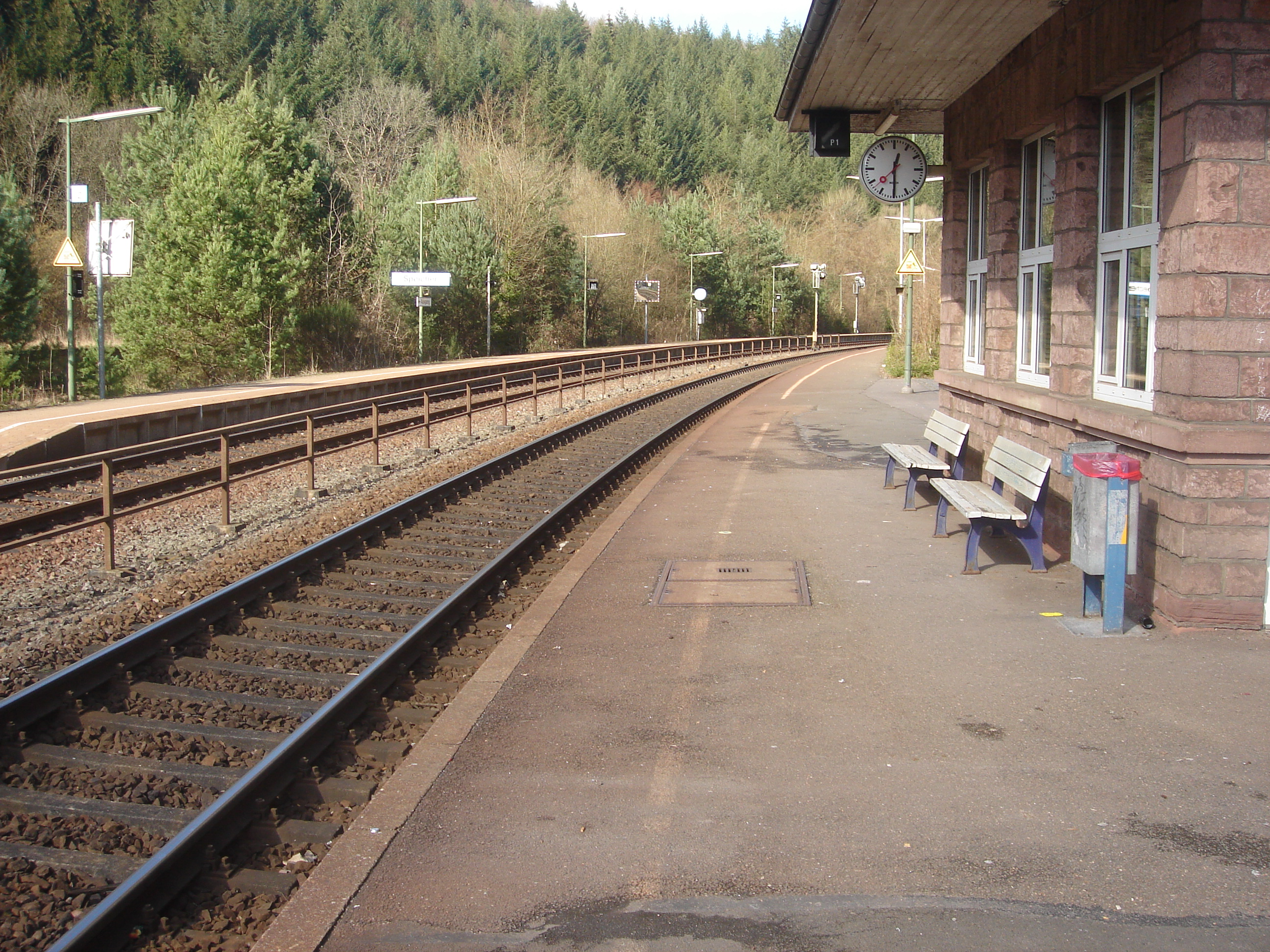 Speicher, Germany Eifelstrecke Cologne-Trier